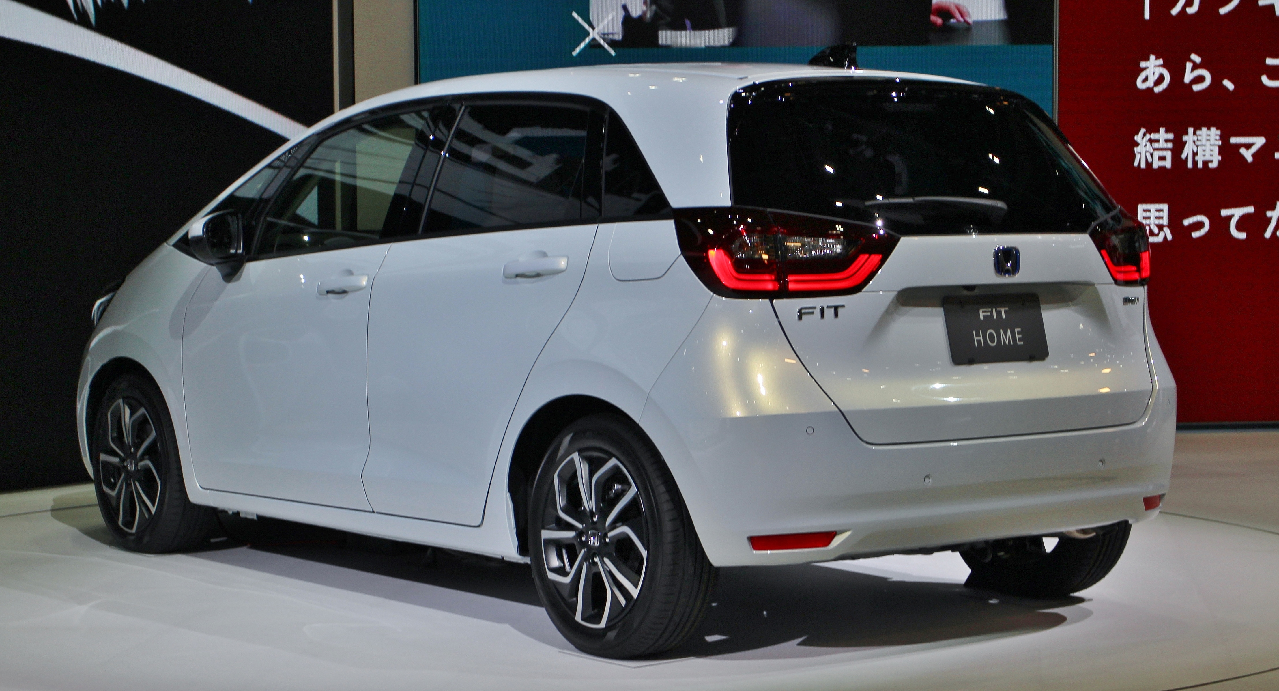 Honda Fit